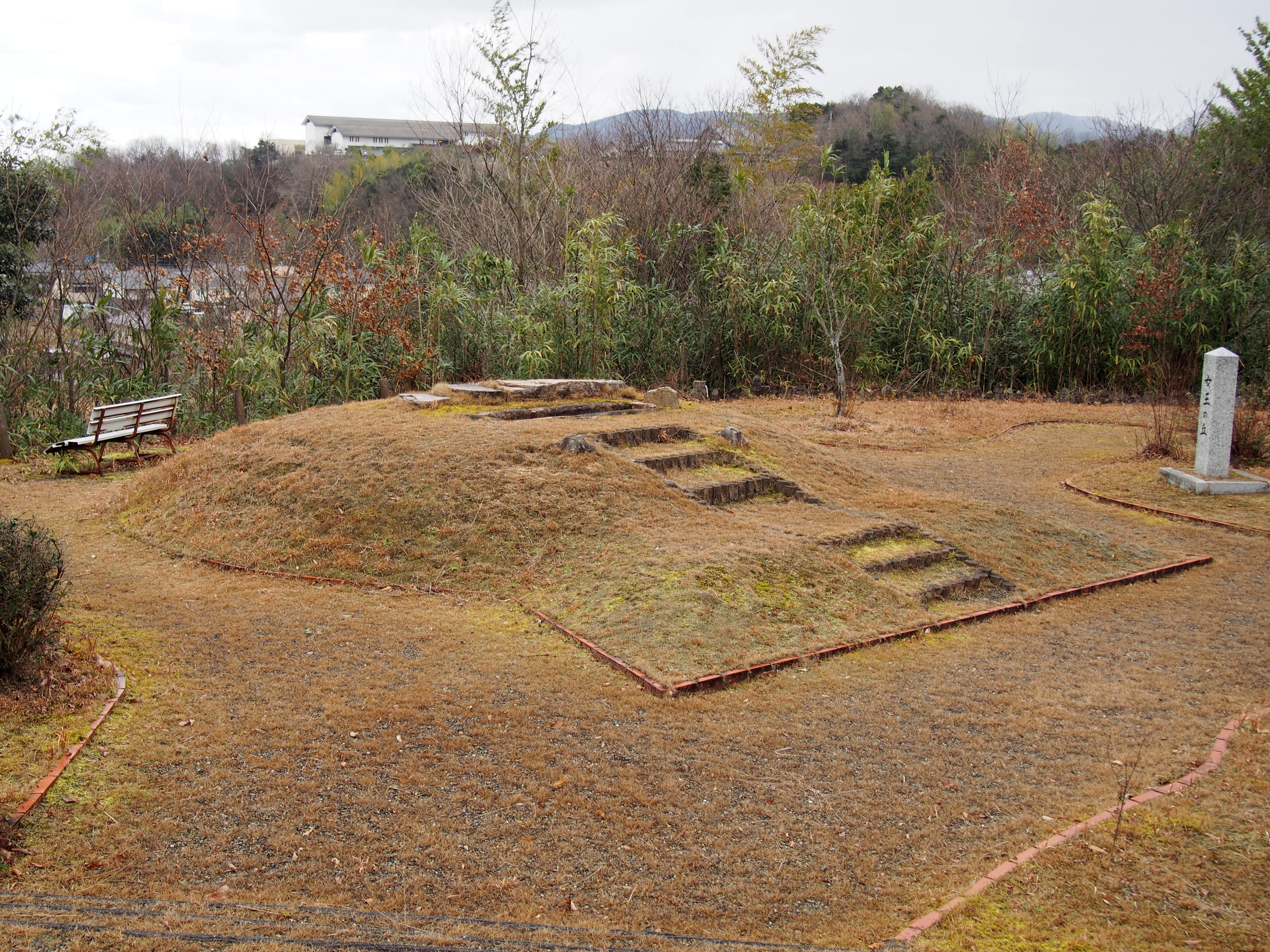 大谷古墳（京都府京丹後市大宮町三坂）